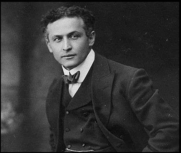 Harry Houdini (született Weisz Erik (Budapest, 1874. március 24. – Detroit, 1926. október 31.) magyar származású amerikai illuzionista és bűvész. Minden idők legnagyobb szabaduló és a modern kor egyik legnagyobb előadóművésze. George Bernard Shaw szerint a legtöbbet emlegetett nevek a világon: Jézus, Sherlock Holmes és Houdini.